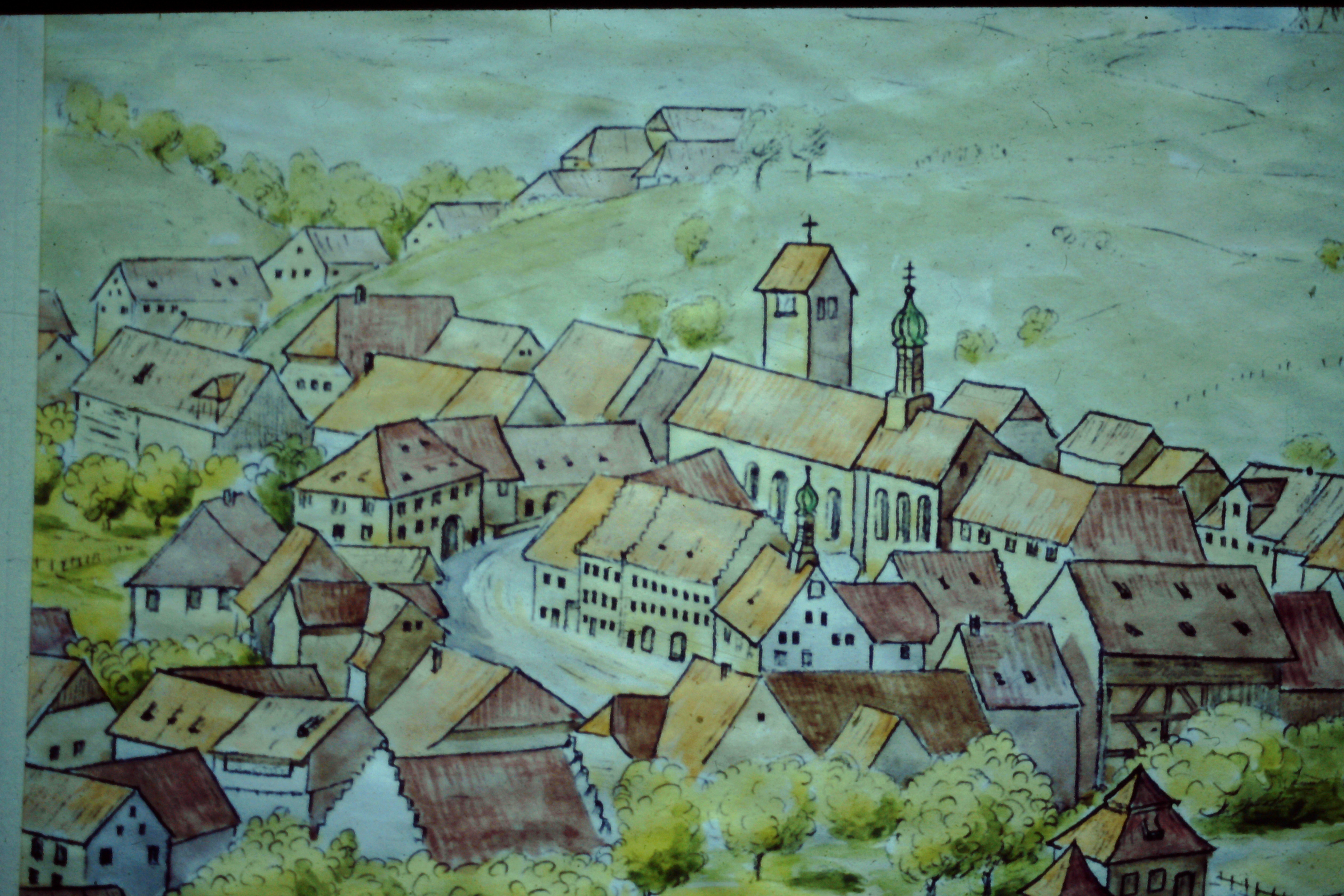 Bonndorf mit Kirche und benachbartem Klostergebäude um 1815 (nachgemalte und kolorierte Fassung einer Zeichnung von Josef Köpfer).